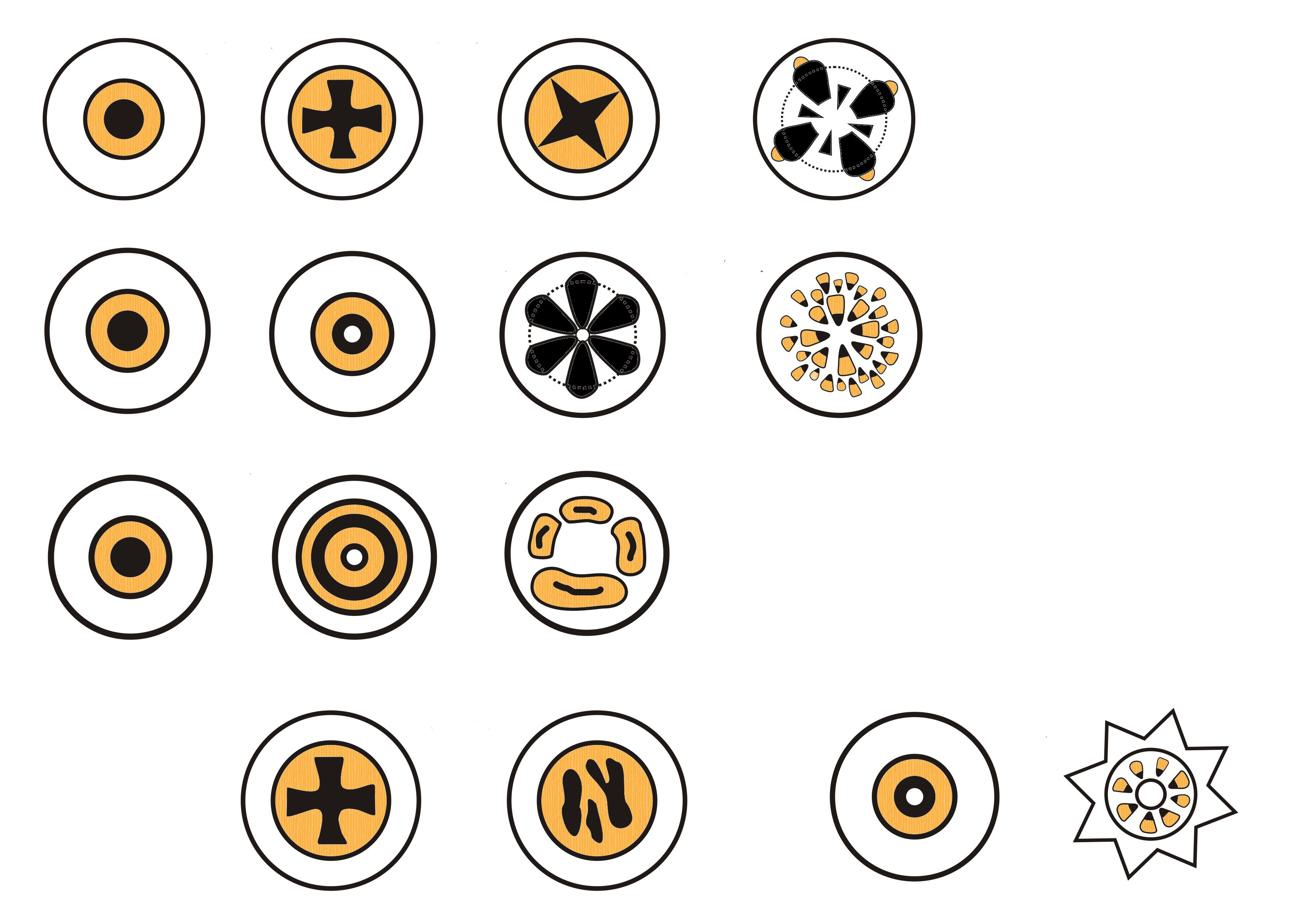 Česky: Obrázek ukazuje různé typy cévních svazků.